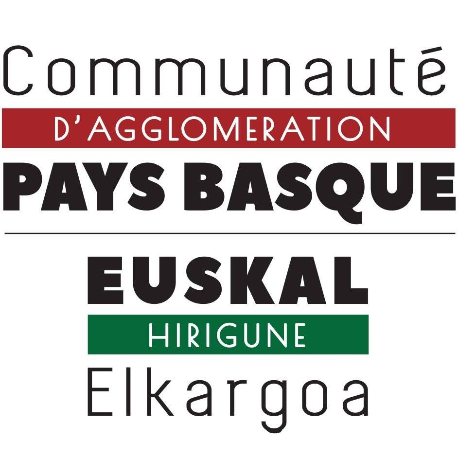 Euskal Hirigune Elkargoaren logotipoa.